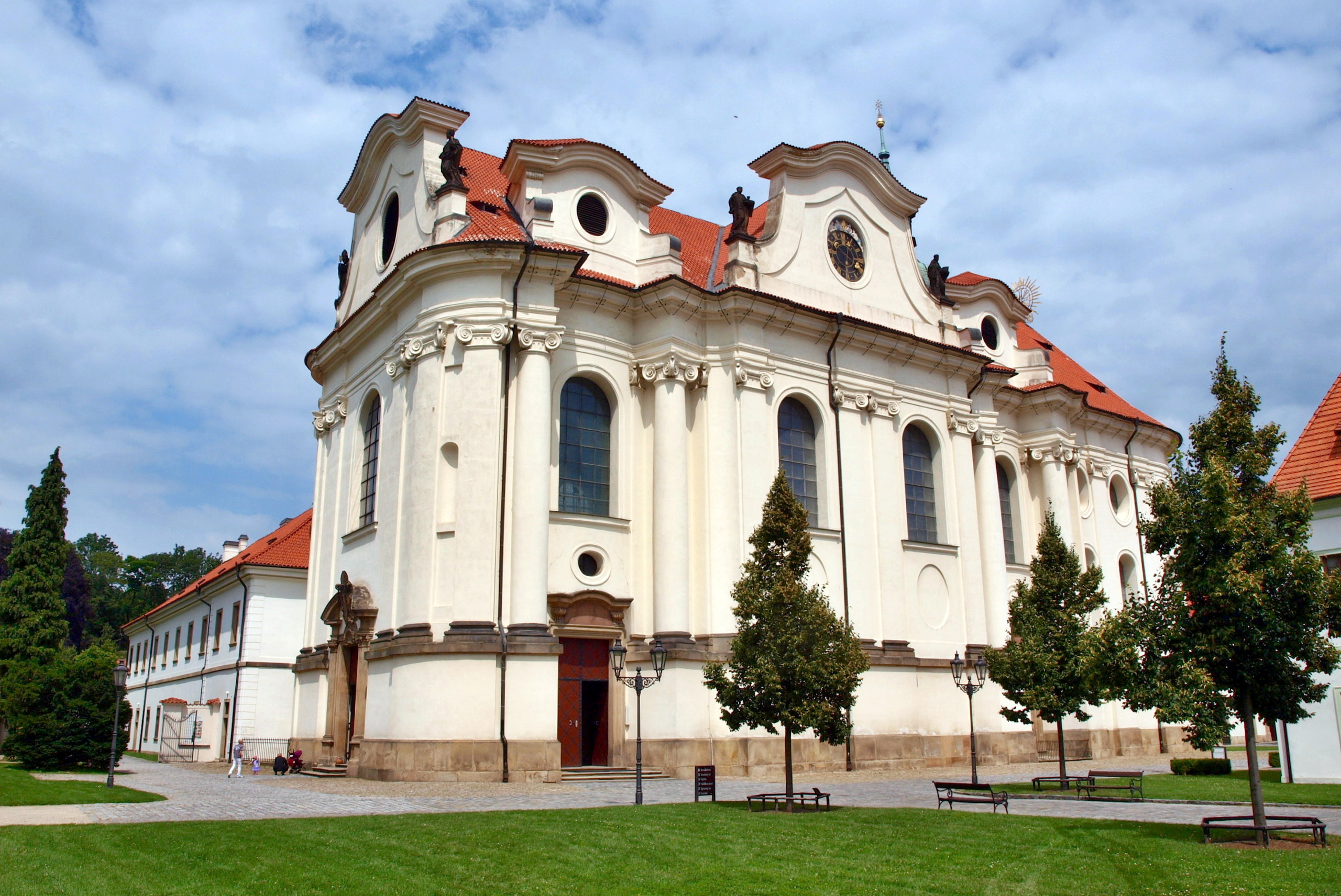 Břevnovská klášterní bazilika sv. Markéty